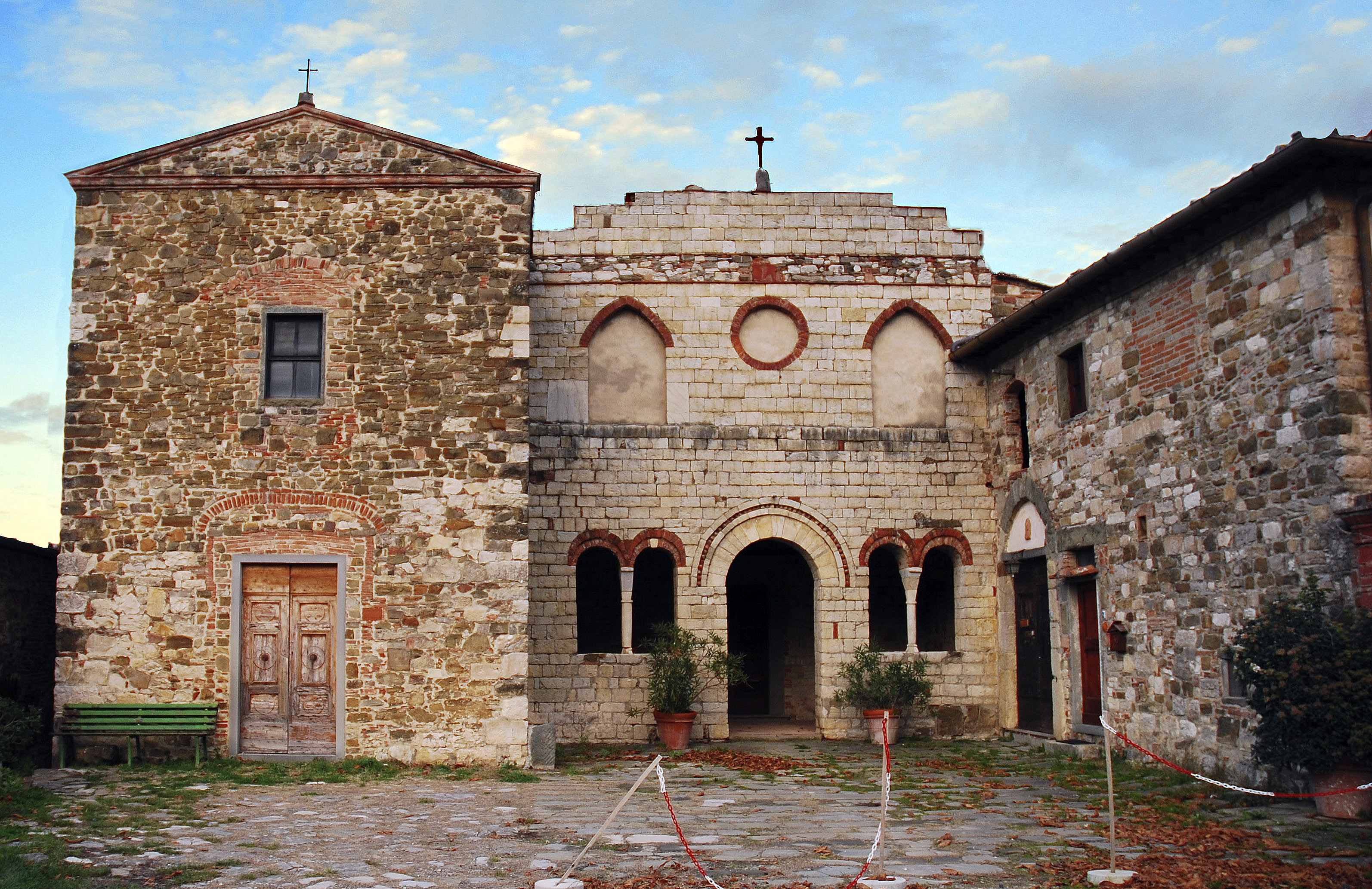 Pieve di San cresci (Greve in Chianti)